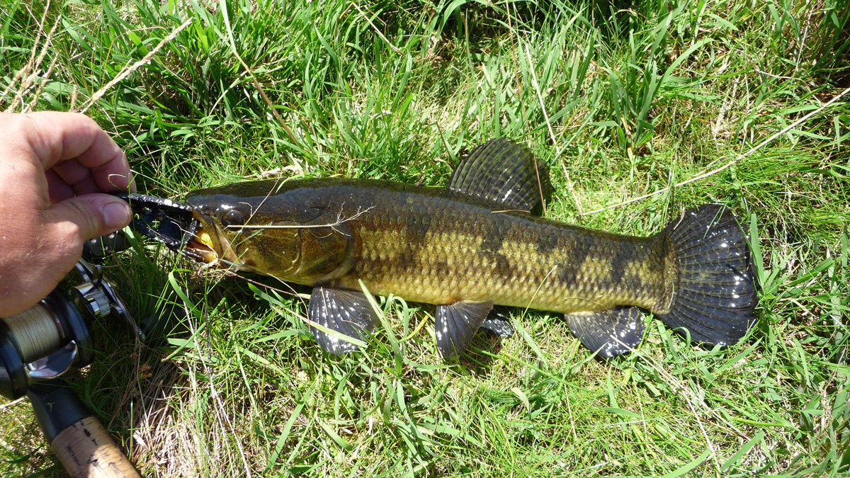 Una pequeña tararira, muy linda y saludable. Pescada en tajamar de rocha Uruguay